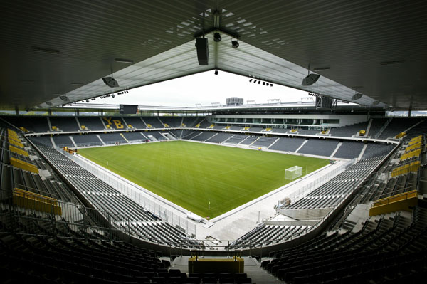 Stade de Suisse von innen.